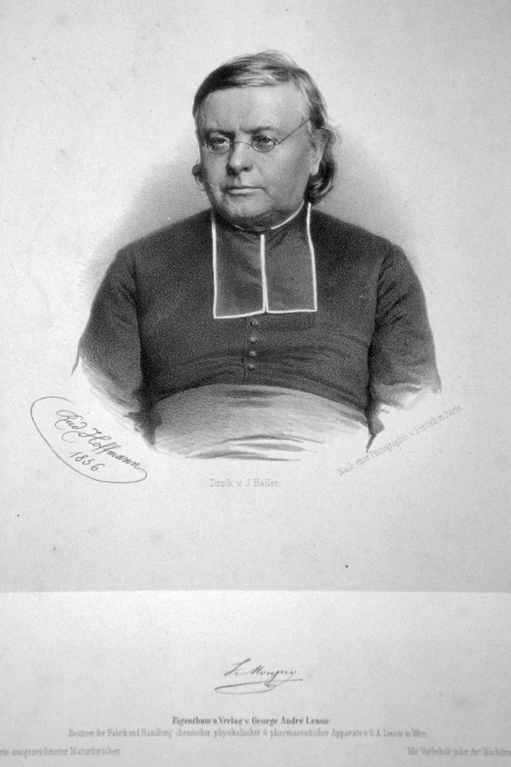 François Napoléon Moigno (französischer Mathematiker, Physiker und Autor) Lithographie von Rudolf Hoffmann, 1856, nach einer Fotografie von Bertsch (Paris)